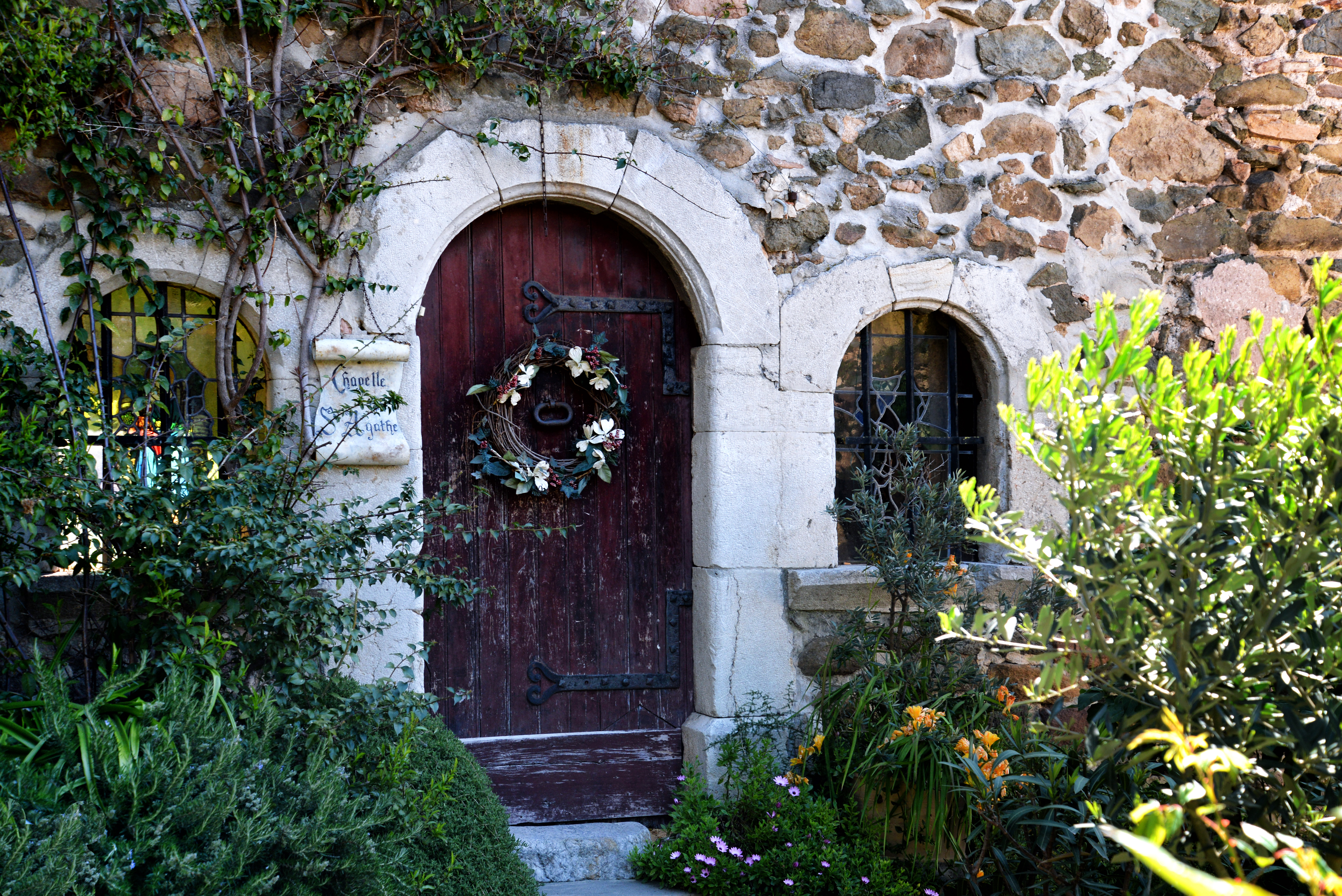 Chapelle Sainte-Agathe de La Garde, proche de la porte Sainte-Aghate au sud de la vieille cité